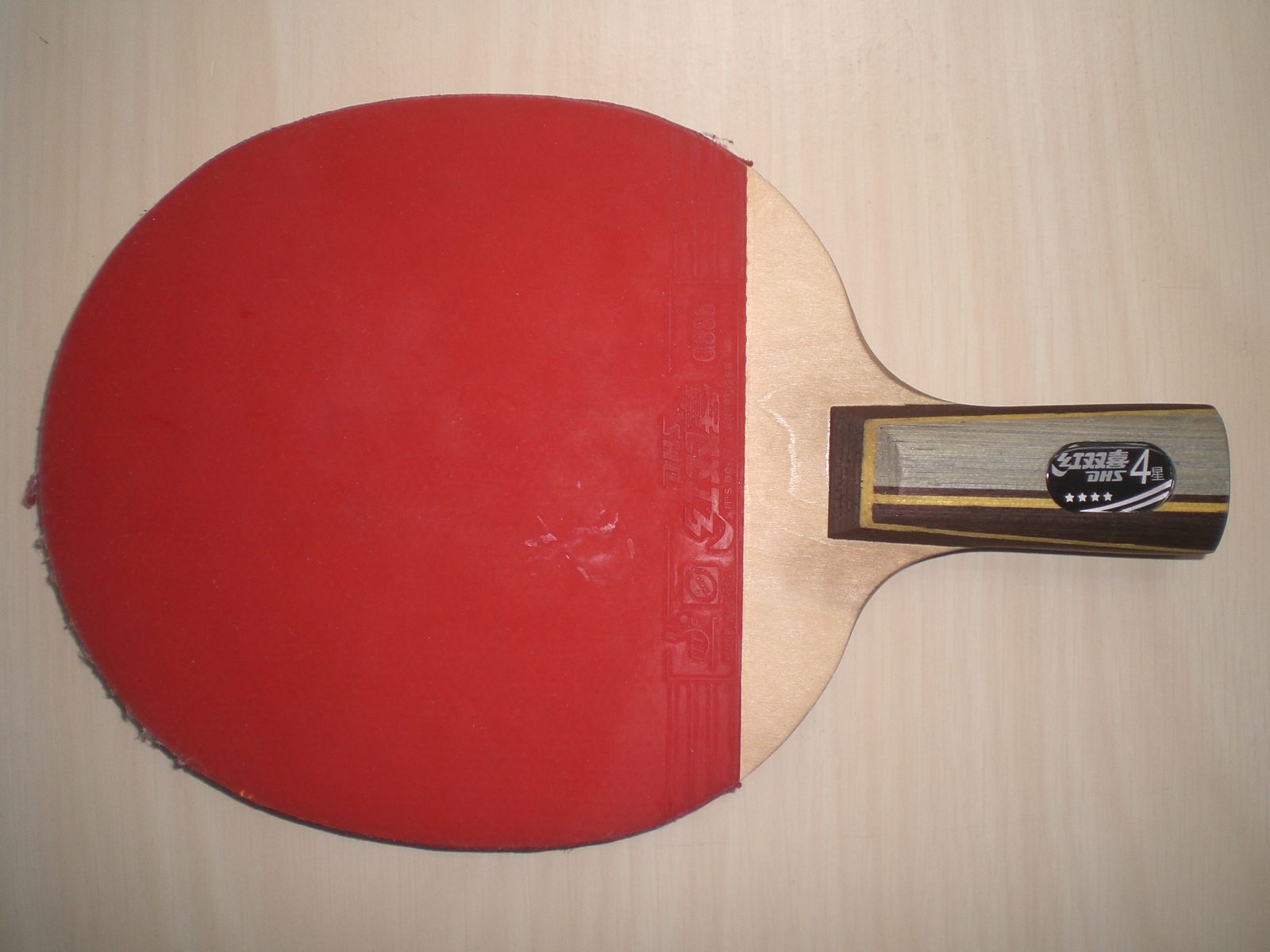 紅雙喜牌子桌球拍, 中國製造中國馳名商標